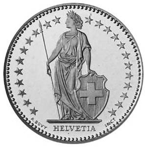 2 CHF coin / Zweifranken